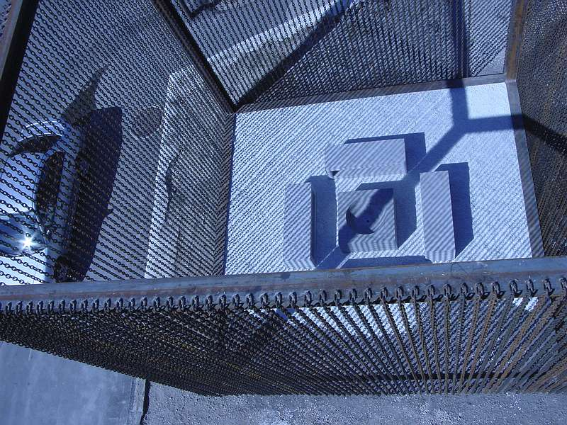 Casagrande & Rintala: Chain Reactor Casagrande & Rintala: Chain Reactor